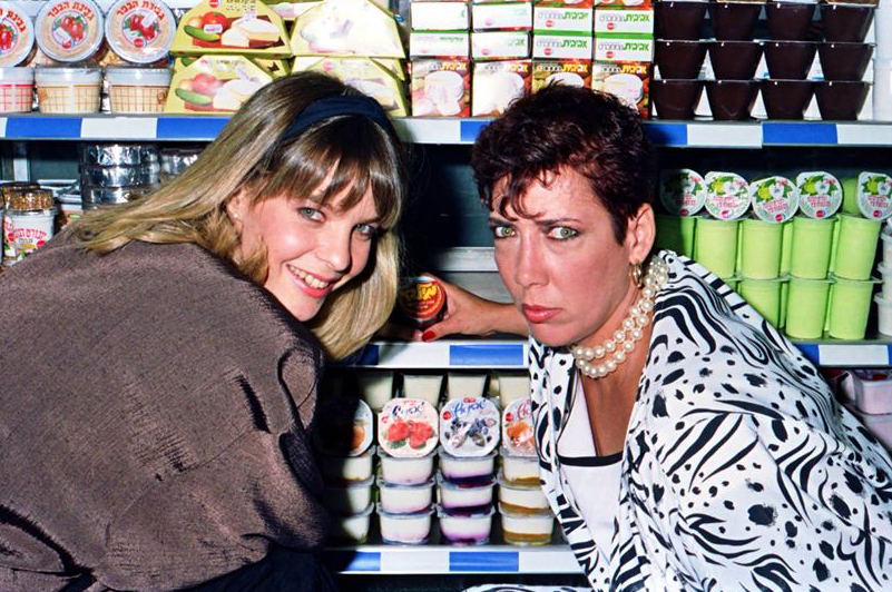 סצינה מתוך הקרב על המילקי 1 השחקניות אביבה פז וחלי גולדנברג